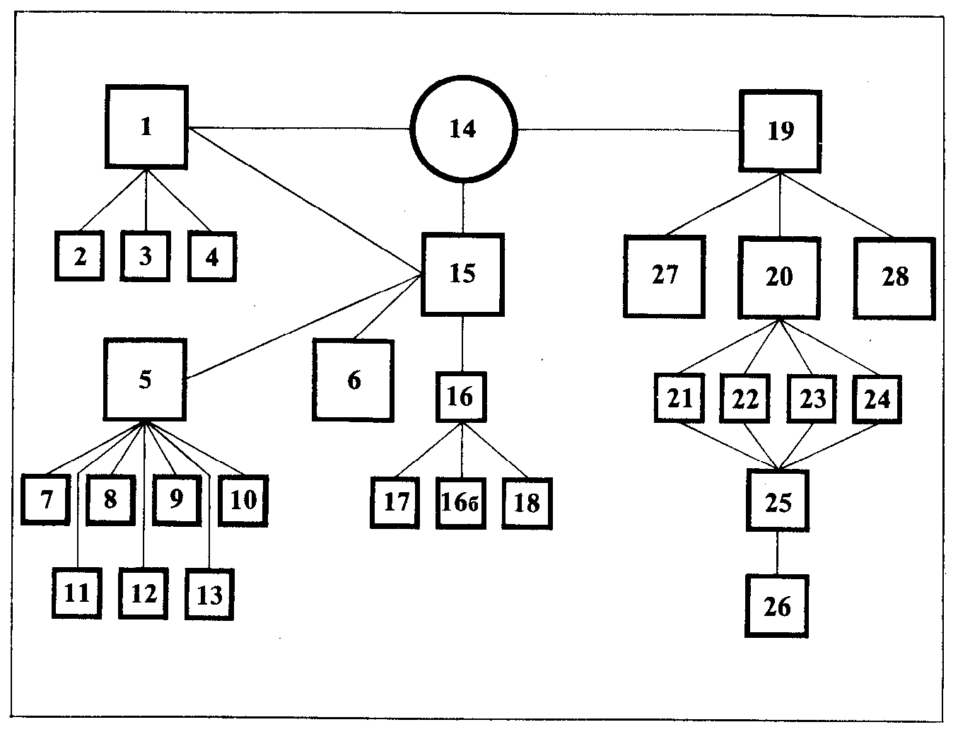 Самоуправление восставших